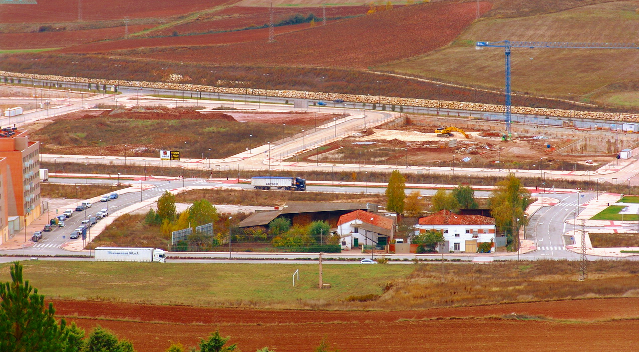 Vista del sector S-8 desde el "Cero de San Miguel" , Burgos (España)